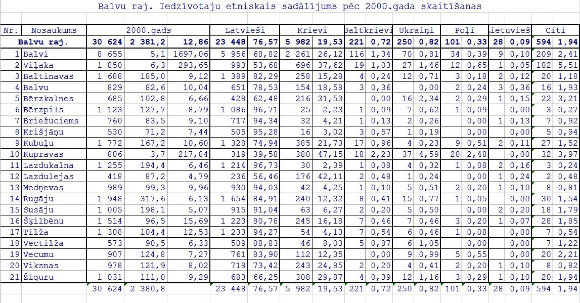 результаты переписи населения Латвии ни 01.04.2000